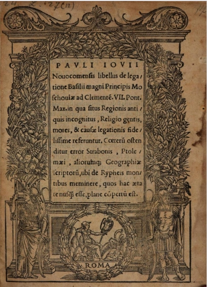 Paulus Iovius, De legatione Basilii magni (1525) title page